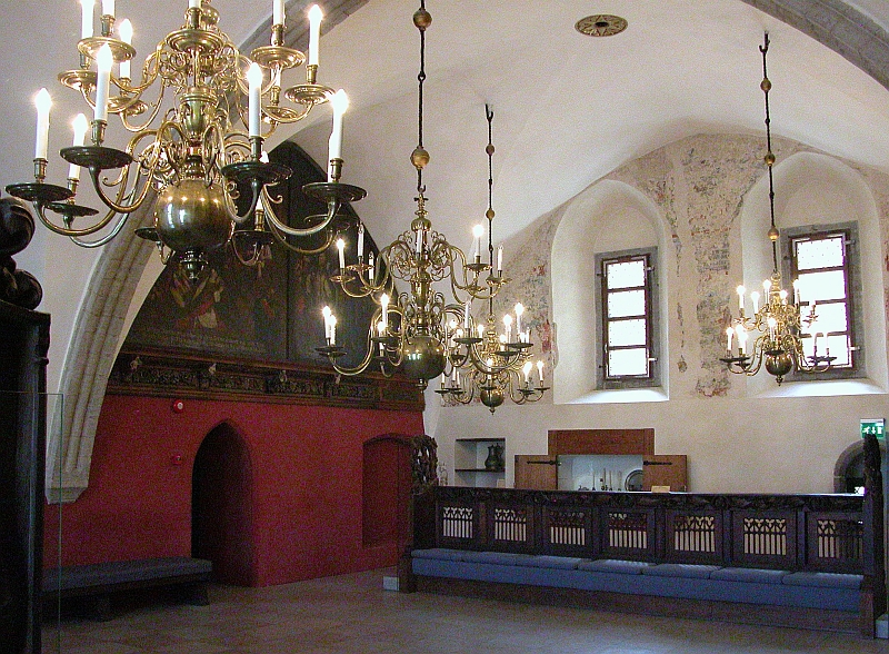 Tallinner Rathaus: Innenaufnahme.